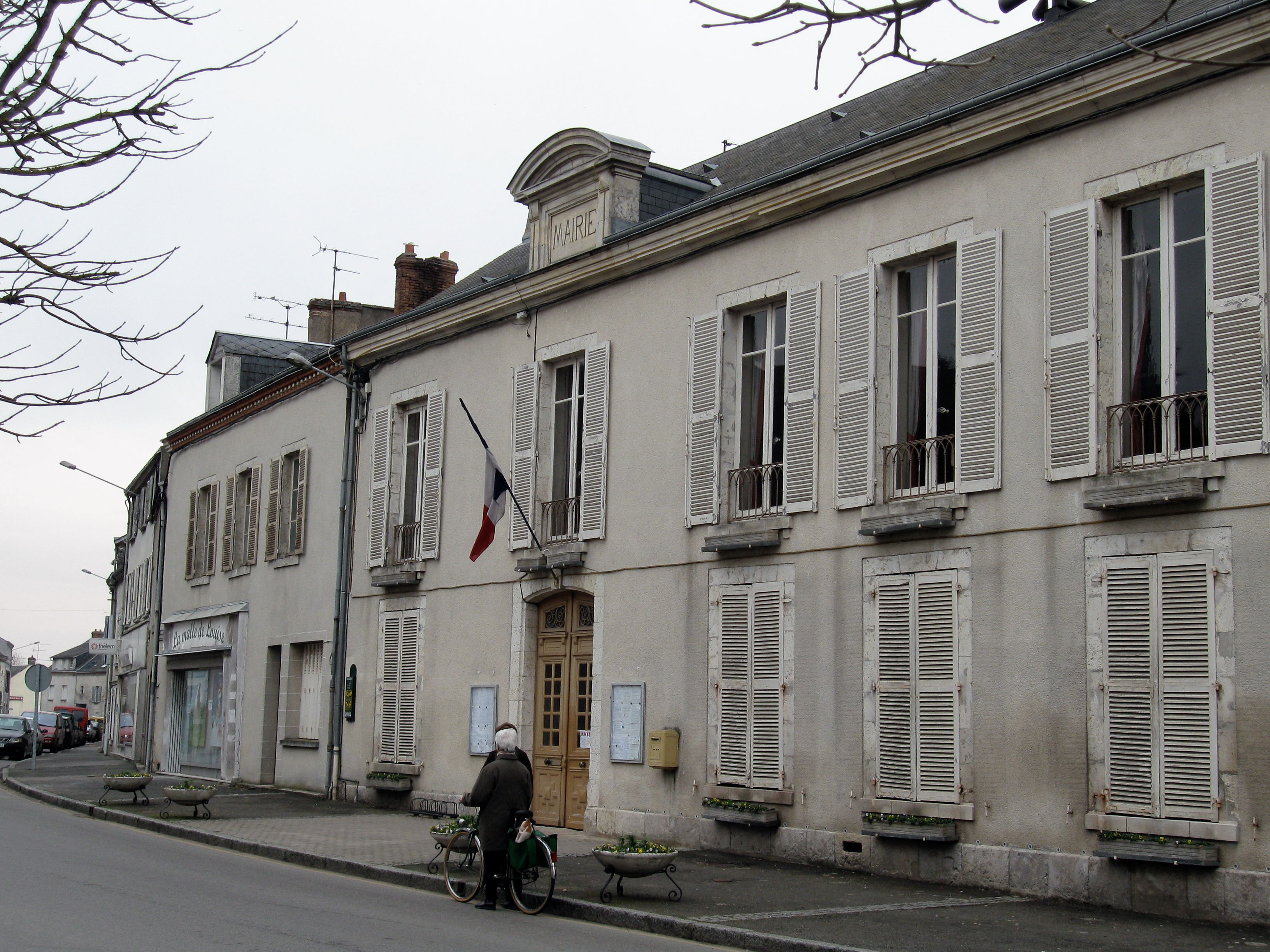 Mairie, Artenay, Loiret, France